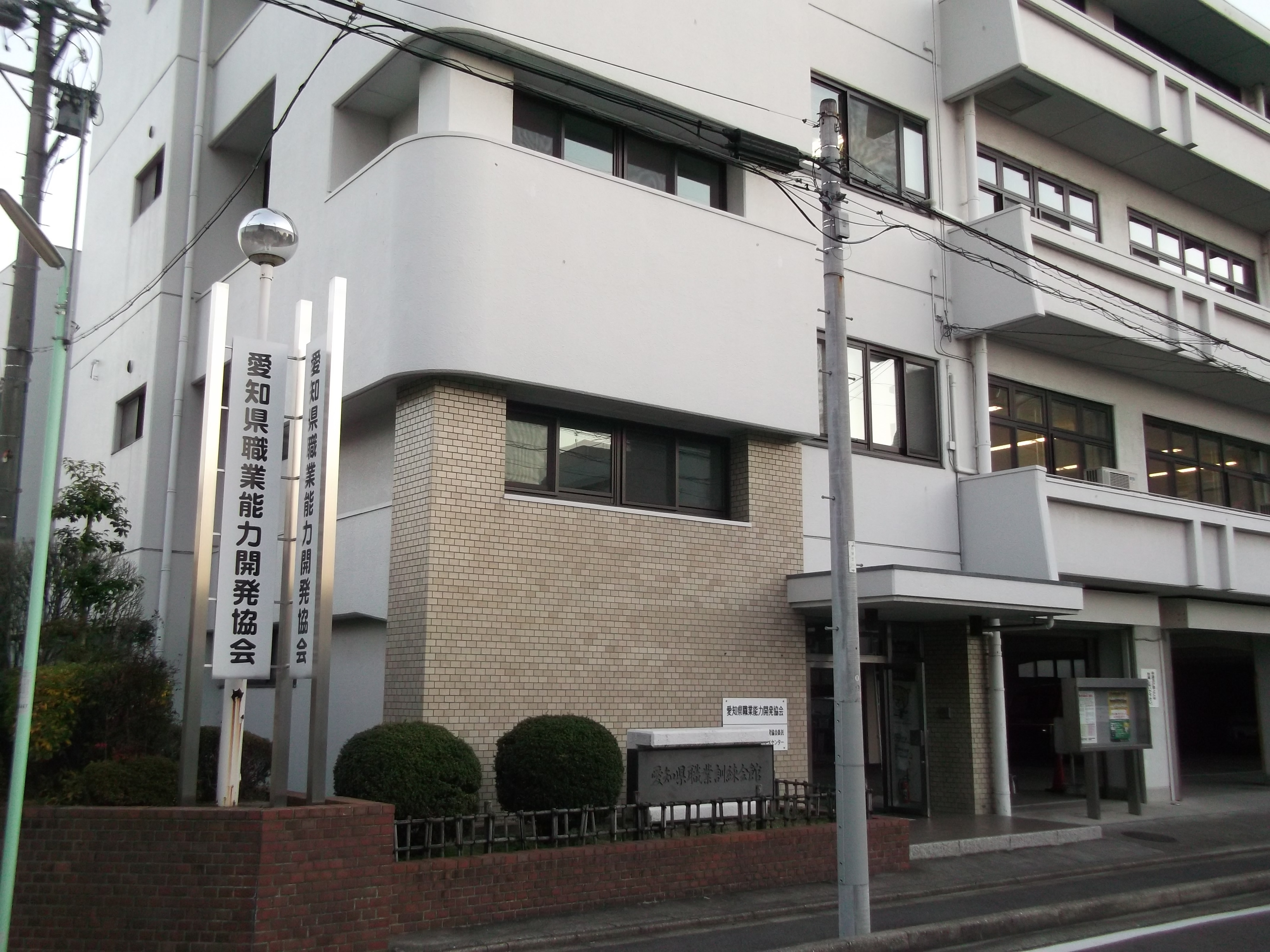 名古屋市西区浅間にある愛知県職業訓練会館を北西側から写す